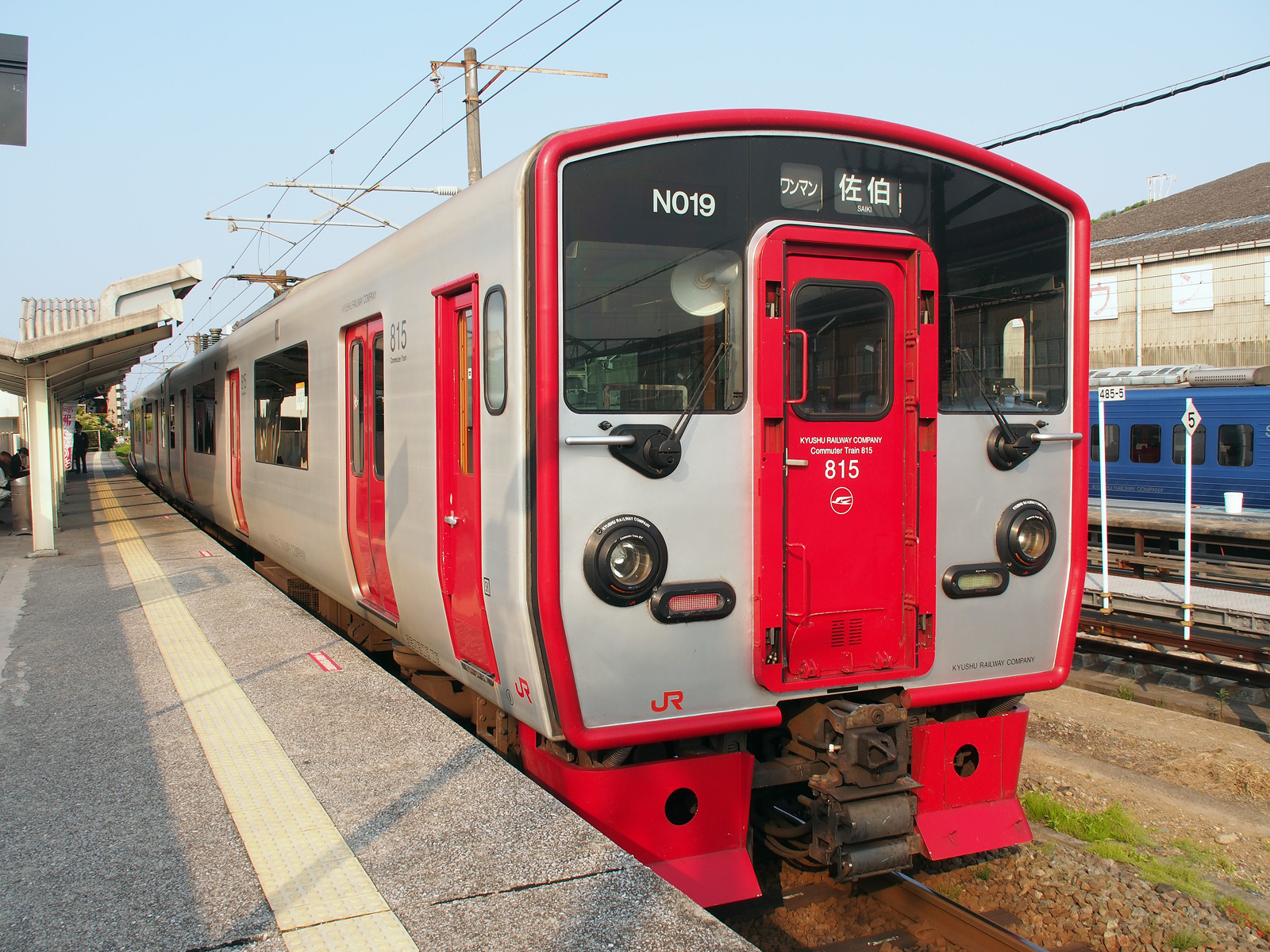 JR牧駅（大分県大分市）